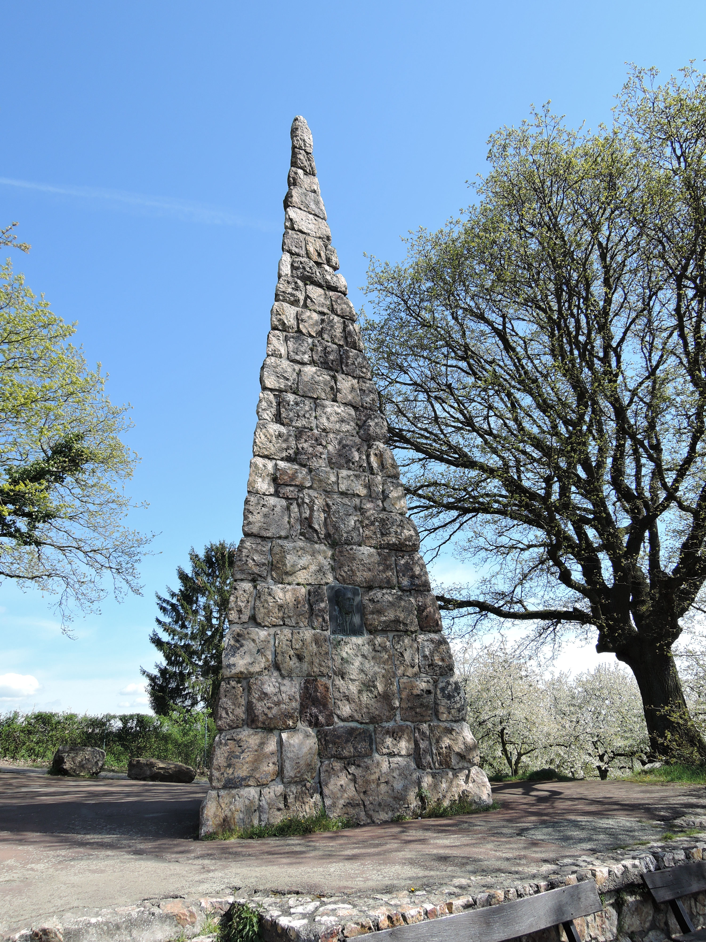 Goethestein in Wiesbaden-Frauenstein vom Rheinsteig aus